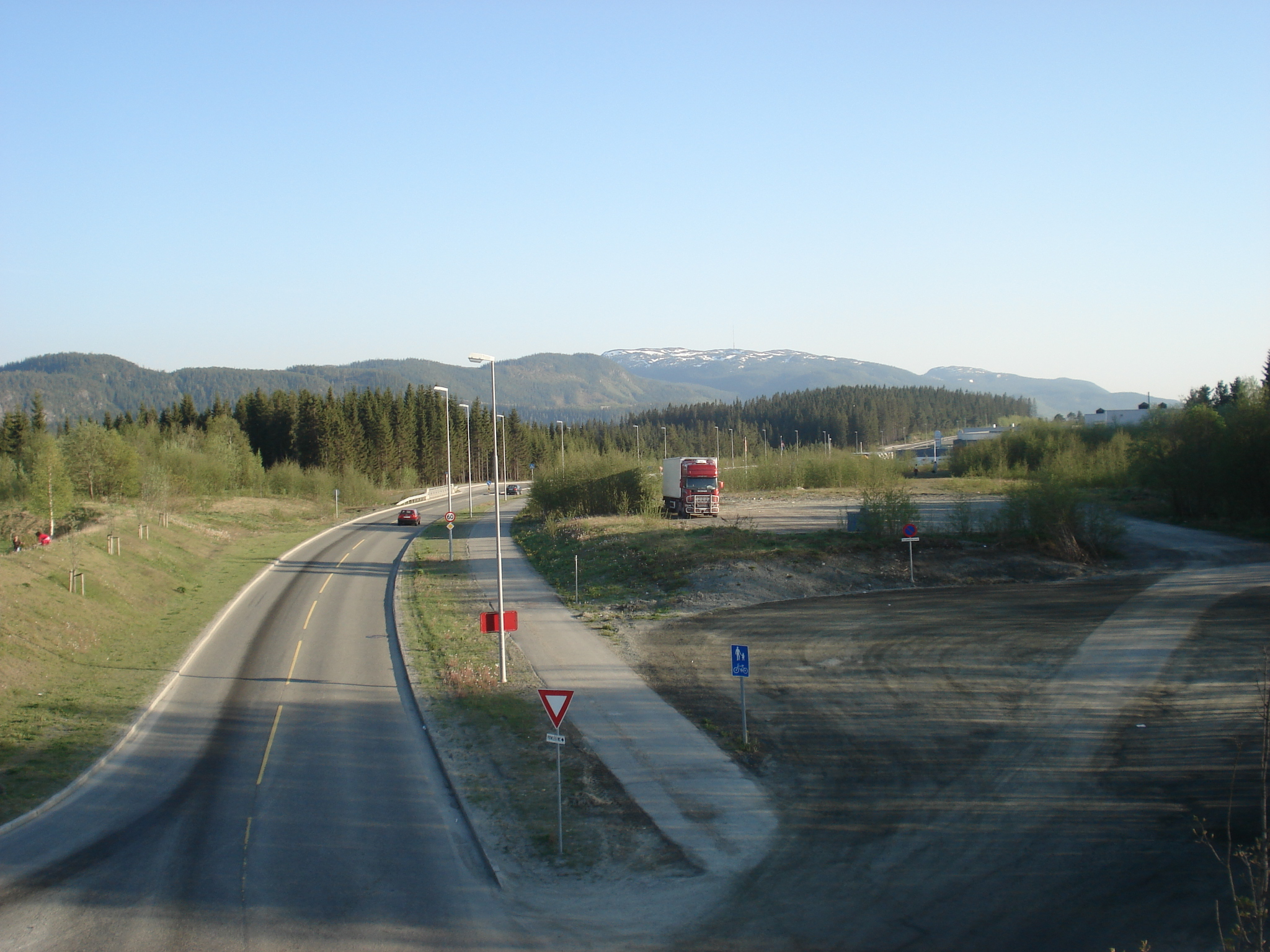 Vassfjellet sett fra Tiller.